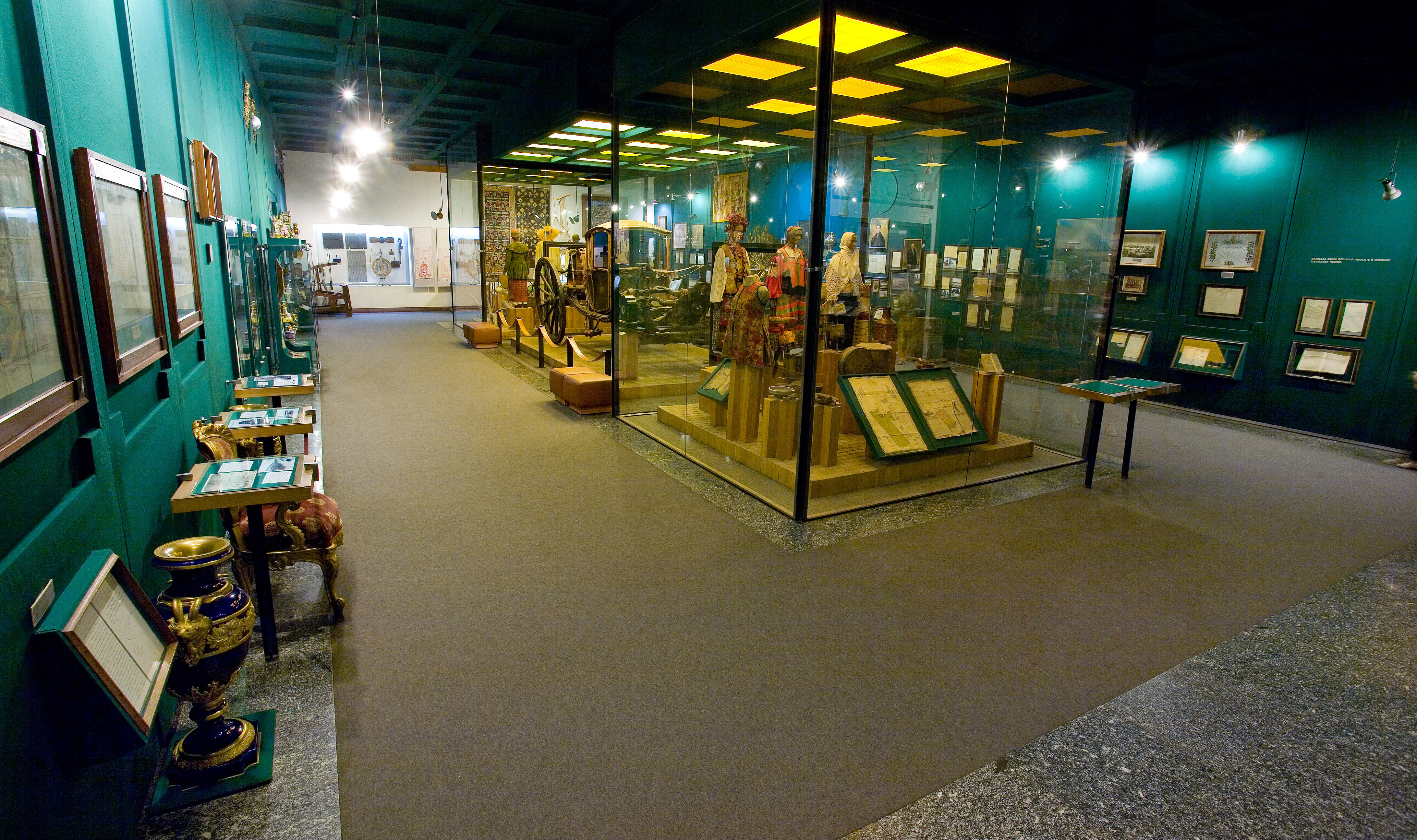 Зала №3. Історія міста та губернії